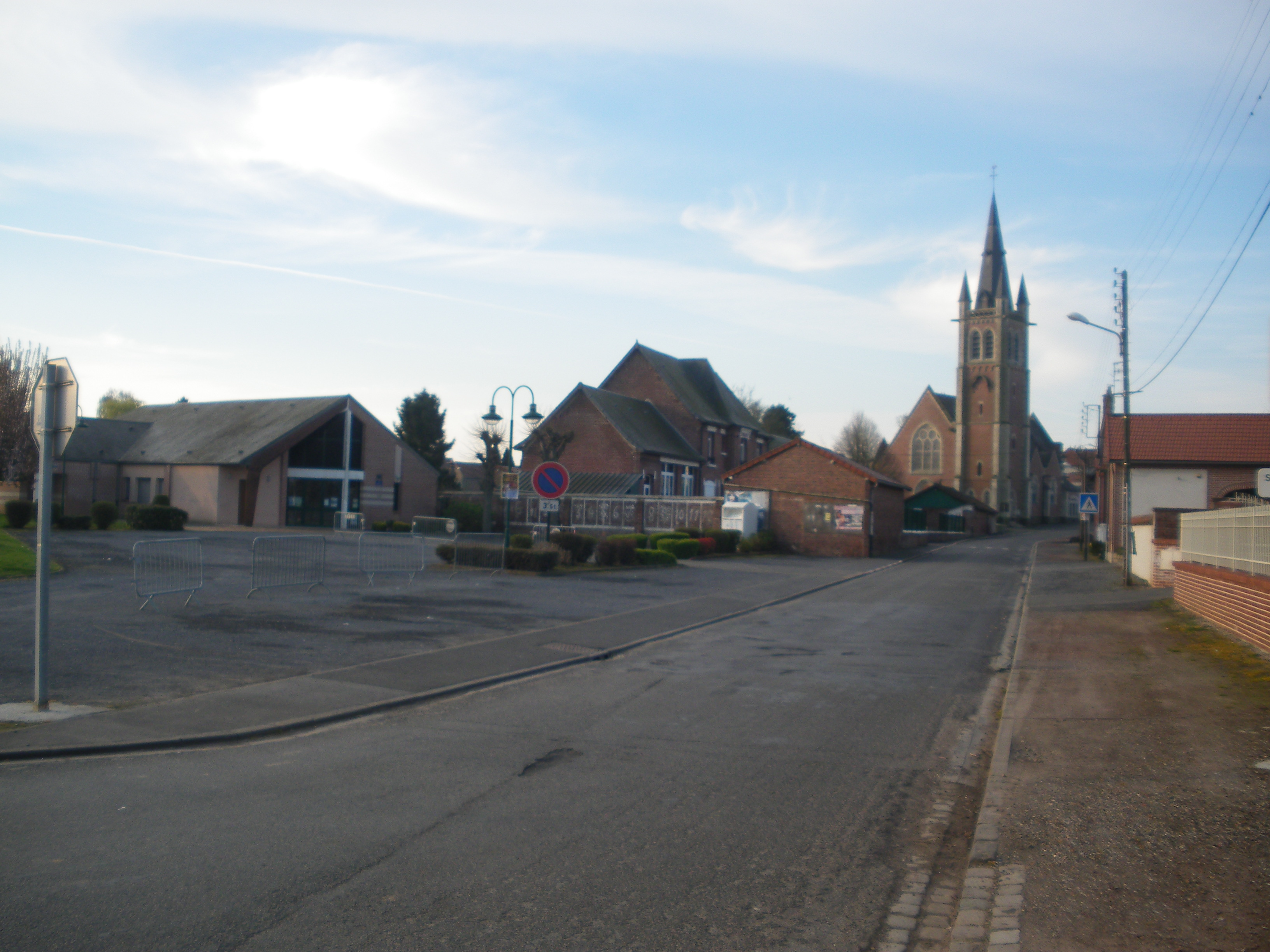 Vue de la commune d'Ervillers.